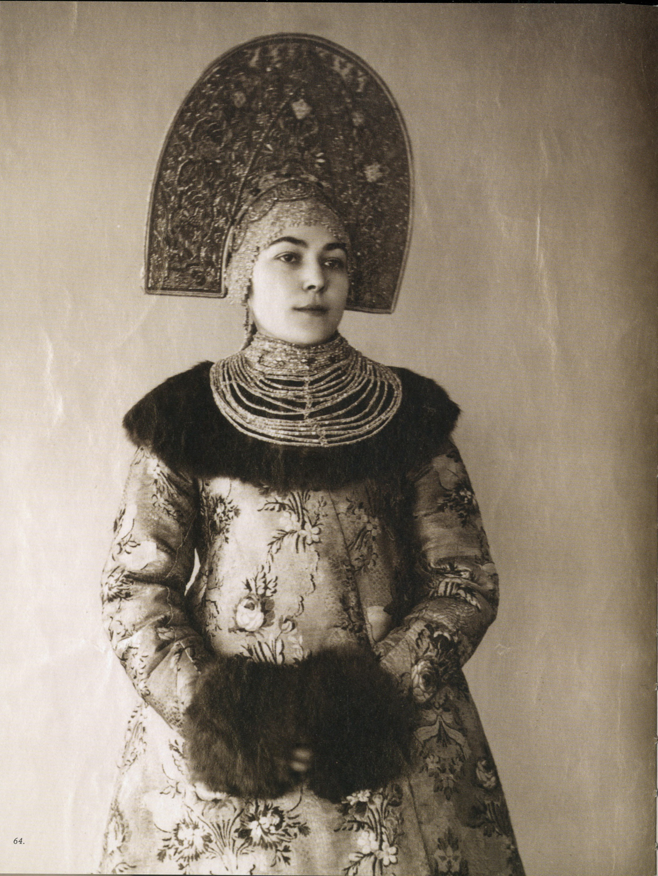 Фотографии коллекции Шабельских из собрания российского этнографического музея